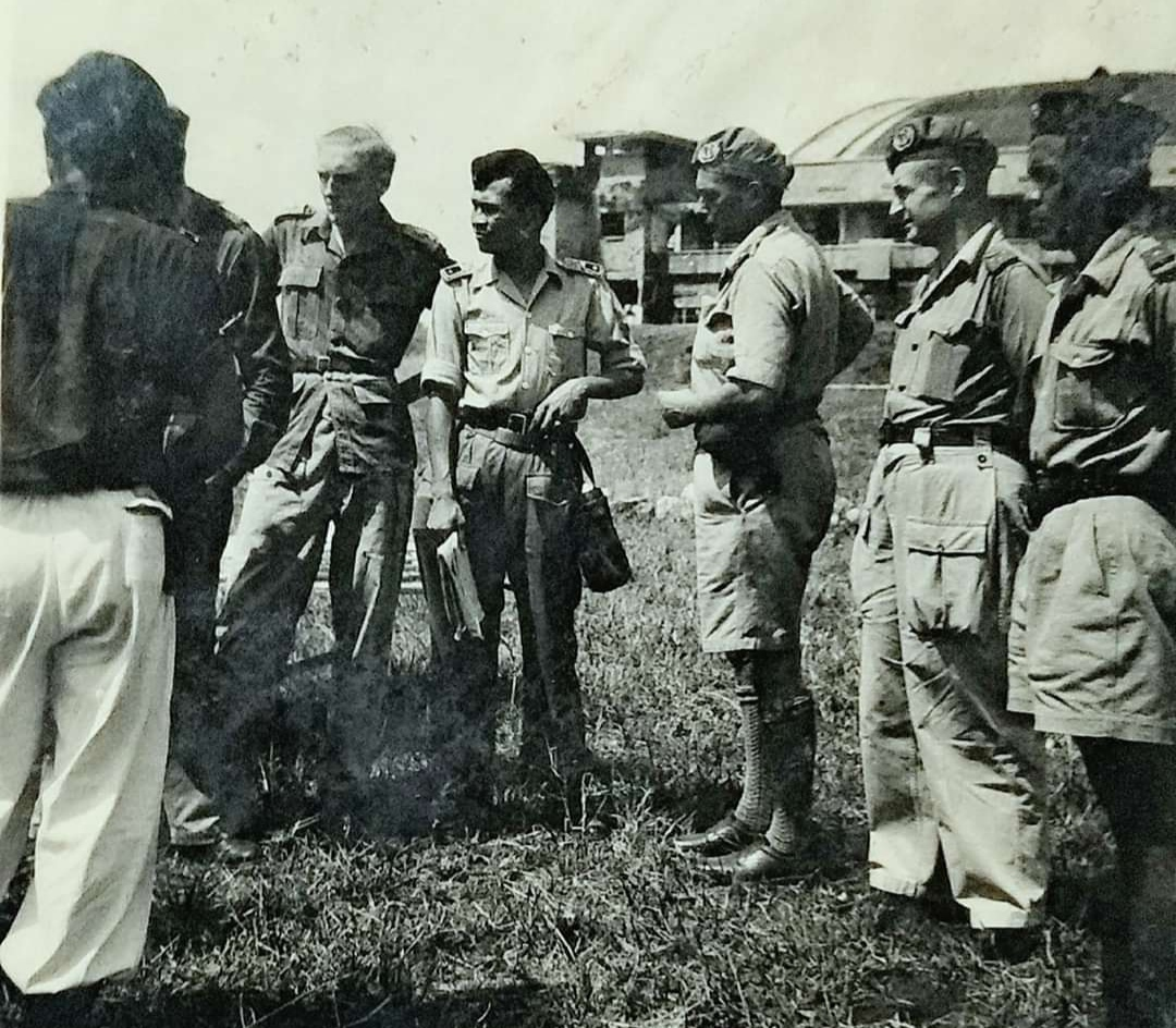 Penyerahan lapangan terbang Maospati dari pihak Belanda